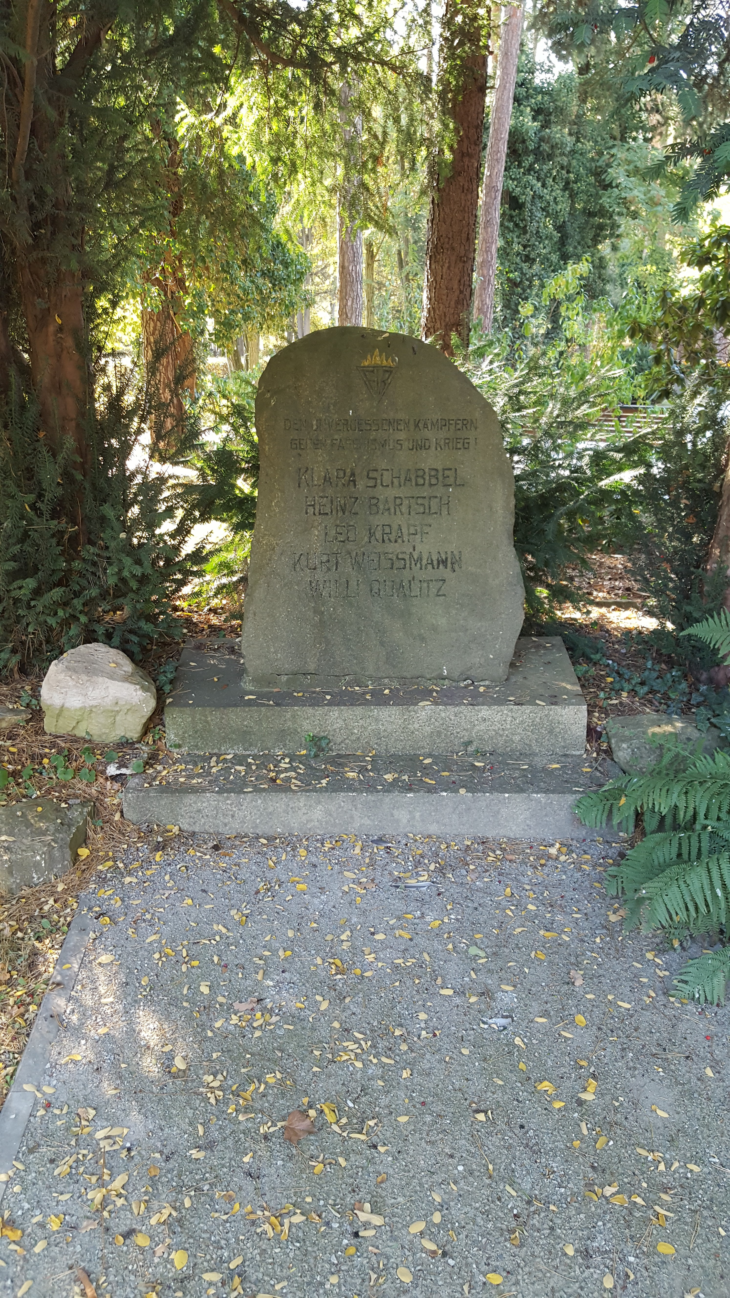 Gedenkstätte für die antifaschistischen Widerstandskämpfer Klara Schabbel, Heinz Bartsch, Leo Krapf, Kurt Weissmann und Willi Qualitz auf dem Waldfriedhof Hennigsdorf.